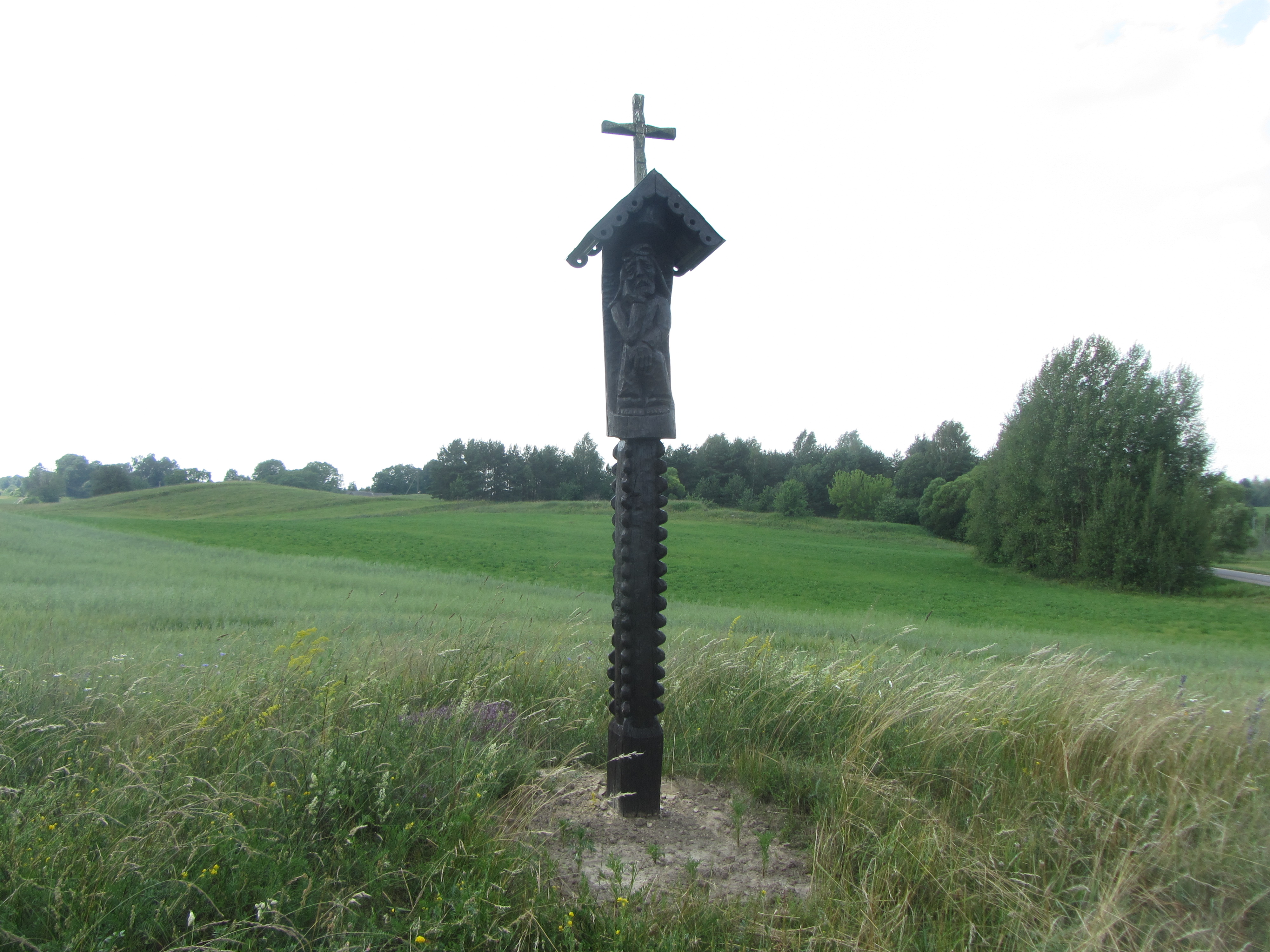 Lazdijų sen., Lithuania